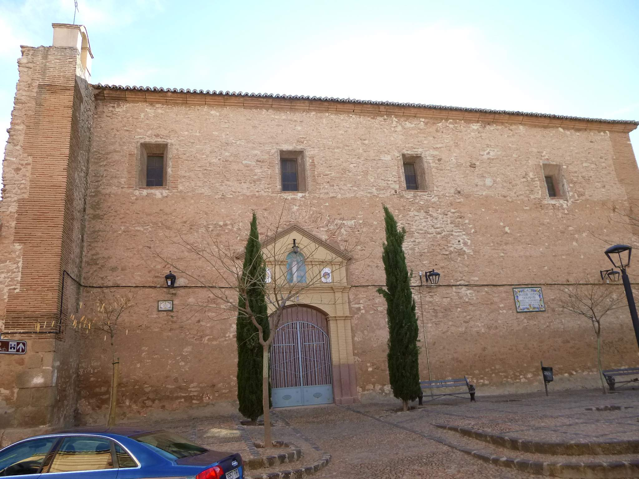 Convento de Concepcionistas Franciscanas Descalzas (Manzanares, Ciudad Real)